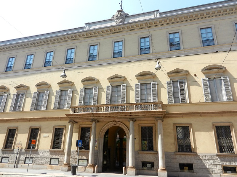 Milano - Palazzo Borromeo d'Adda